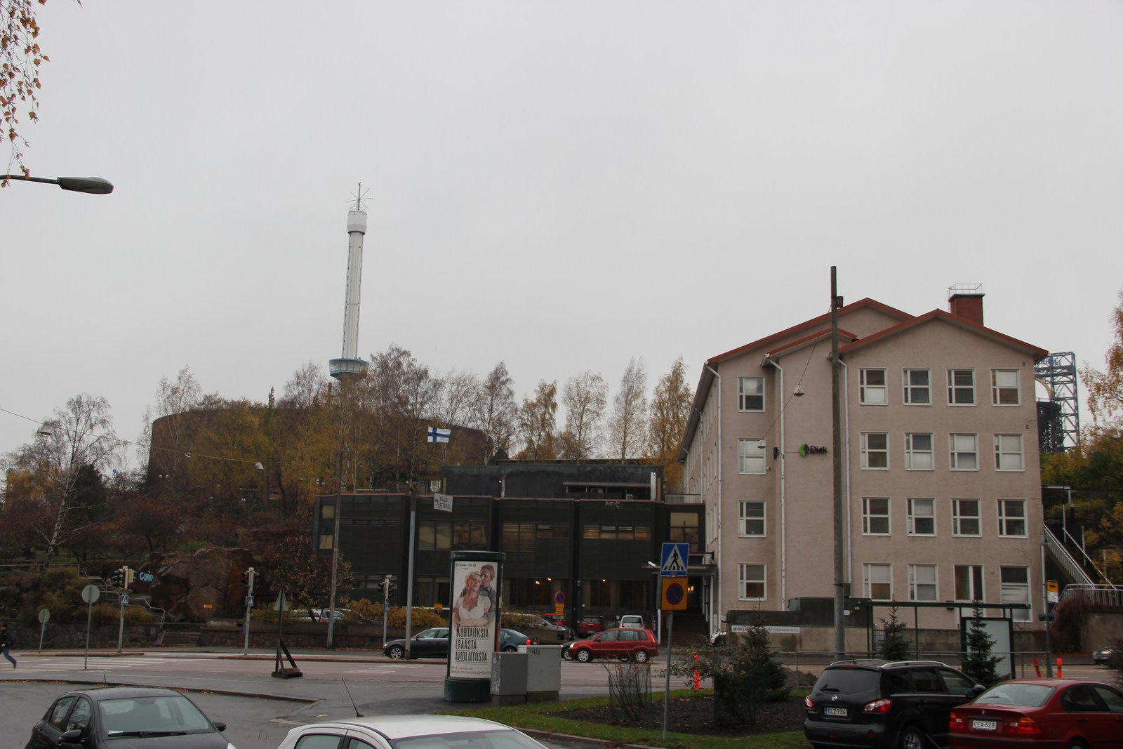 Linnanmäki (vas.) ja Helsingin Kauppaoppilaitos, nyk. Diakonia-ammattikorkeakoulu